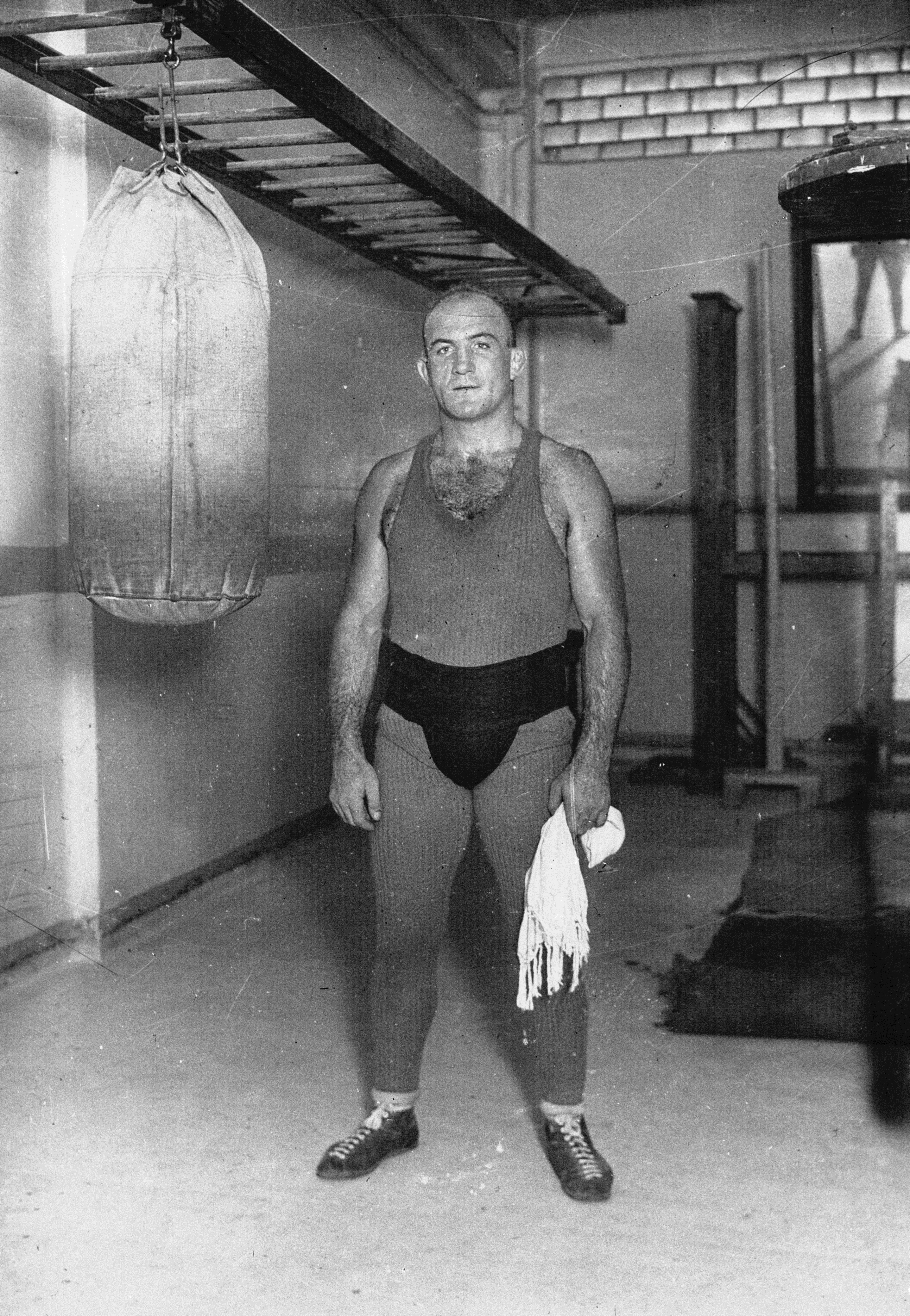 Suvigny, champion olympique à son travail.